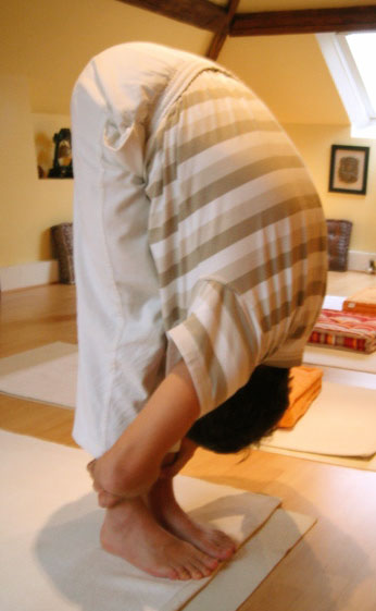 Yoga postures Uttanasa